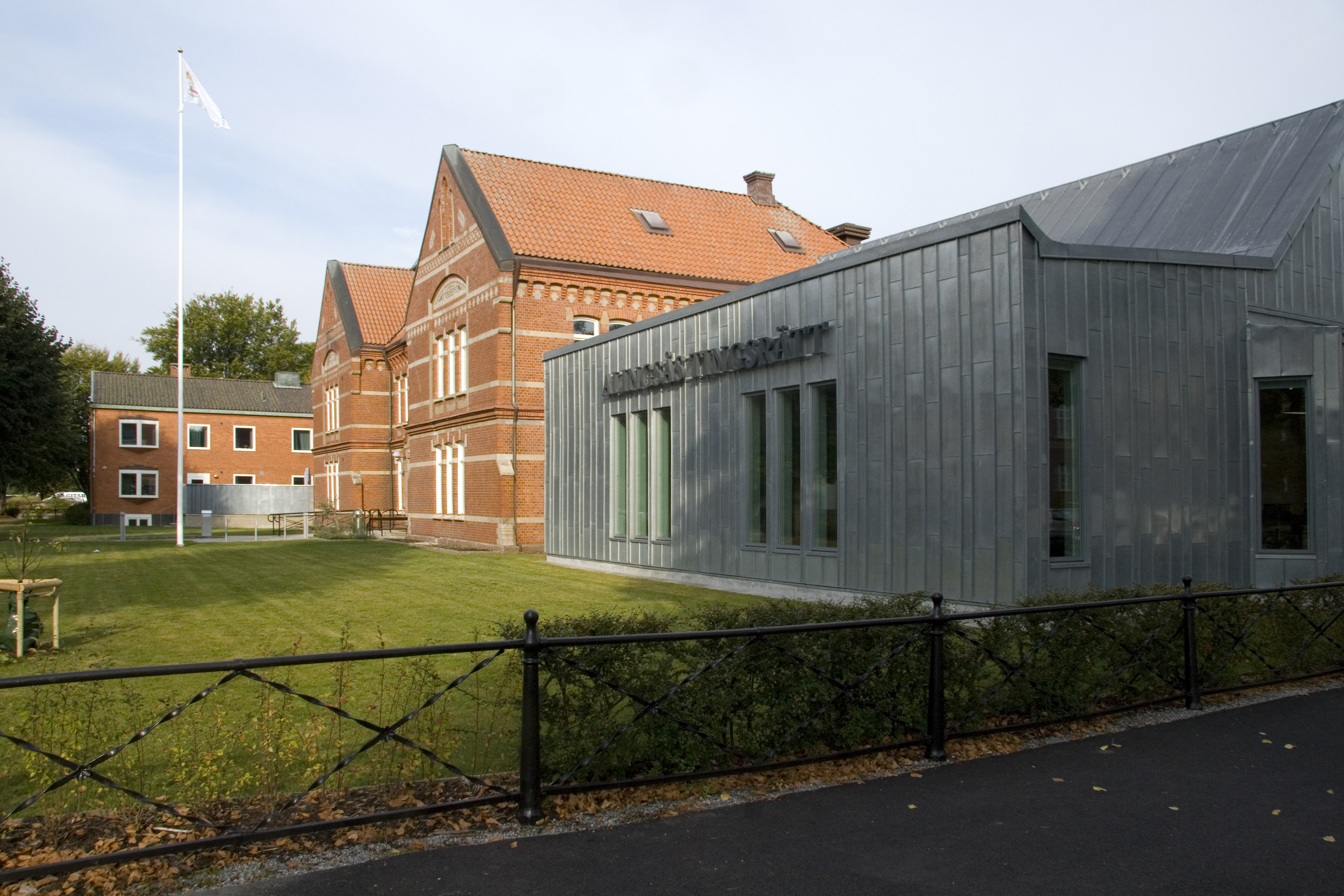 Alingsås tingsrätt, ursprungligen uppförd 1899 efter ritning av Adrian C. Peterson, tillbyggd under andra halvan av 1950-talet samt med en tillbyggnad 2016, ritad av Fritz Olausson och Magnus Almung vid Tengbom arkitekter. Foto från korsningen Södra Ringgatan, Gustav Adolfsgatan.